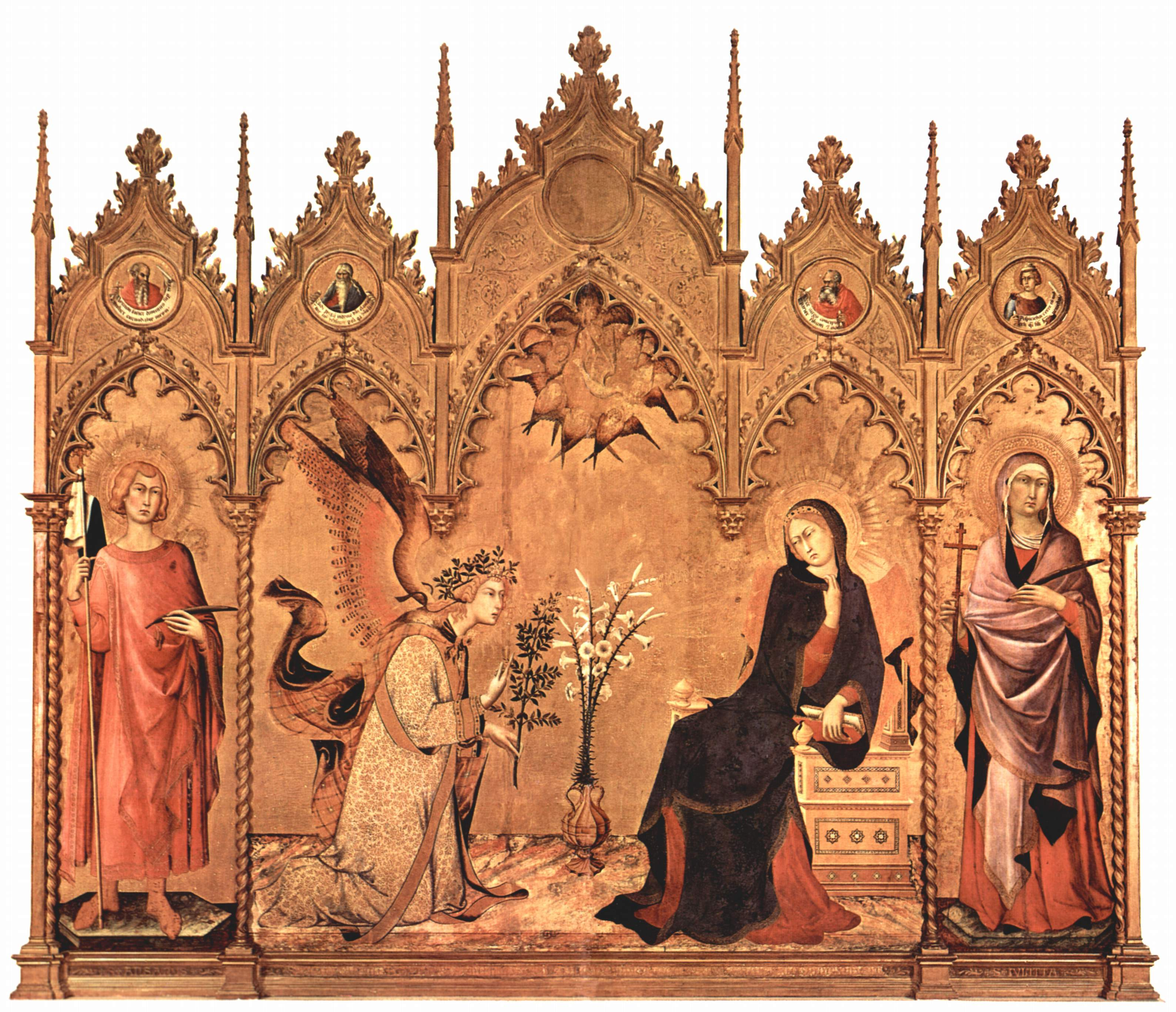 Mitteltafel: Maria Verkündigung, links: Hl. Ansanus von Siena, rechts: Heilige Maxima, Mutter des Ansanus (oder Margarethe), in den Giebelfeldern vier Medaillons mit den Propheten Jeremias, Ezechiel, Jesaiah und Daniel